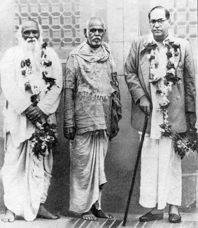 संत गाडगेबाबांनी पंढरपूर येथील धर्मशाळा डॉ. बाबासाहेब आंबेडकरांना अर्पण केली. त्यावेळी डावीकडून कर्मवीर भाऊराव पाटिल, संत गाडगेबाबा व डॉ. बाबासाहेब आंबेडकर. (१४ जुलै १९४९)